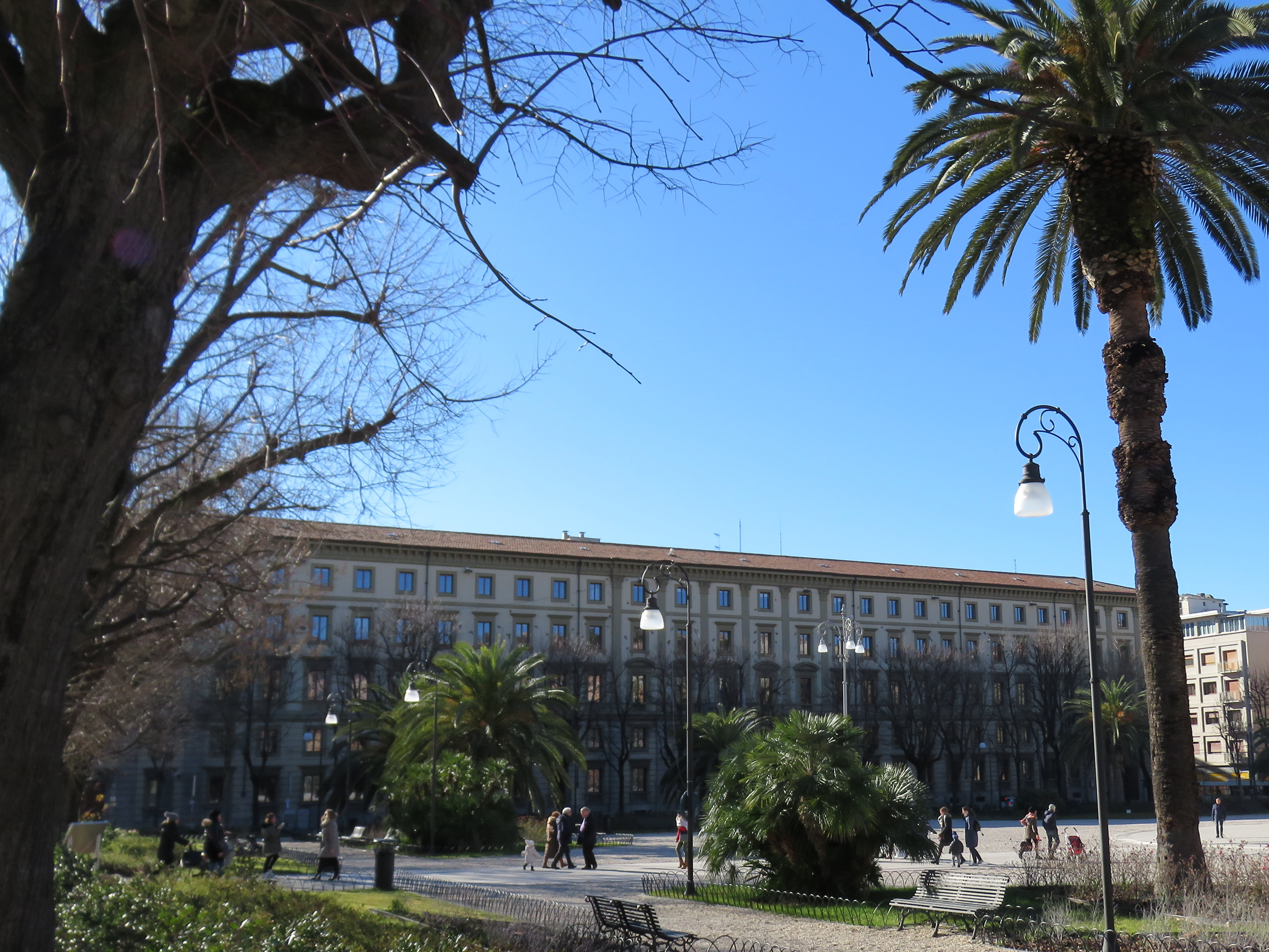 Palazzo delle Marche, situato in Ancona, a Piazza Cavour: è la sede del Consiglio Regionale delle Marche.